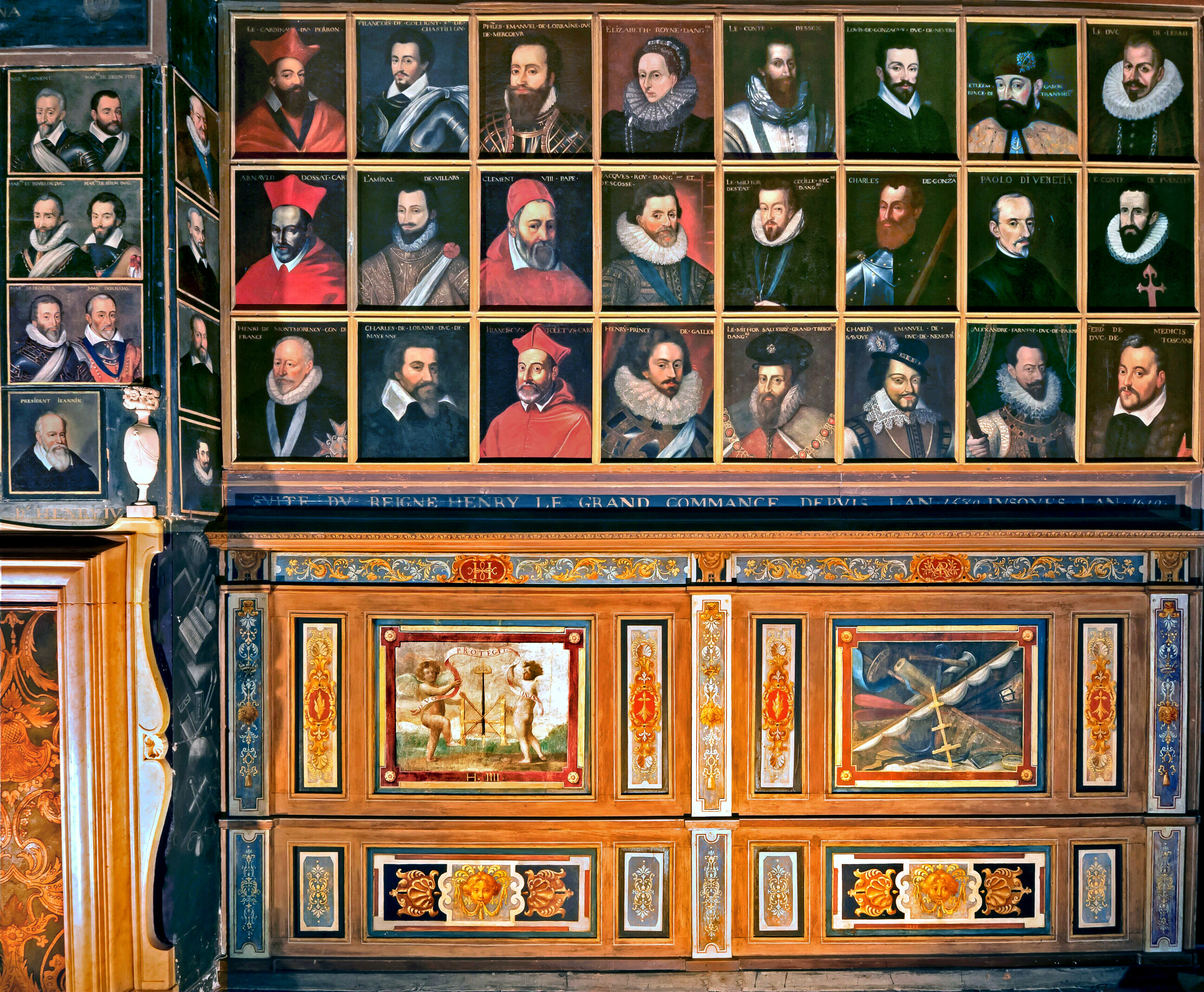 Beauregard, Galerie berühmter Persönlichkeiten, Das Zeitalter von König Henri IV.pg